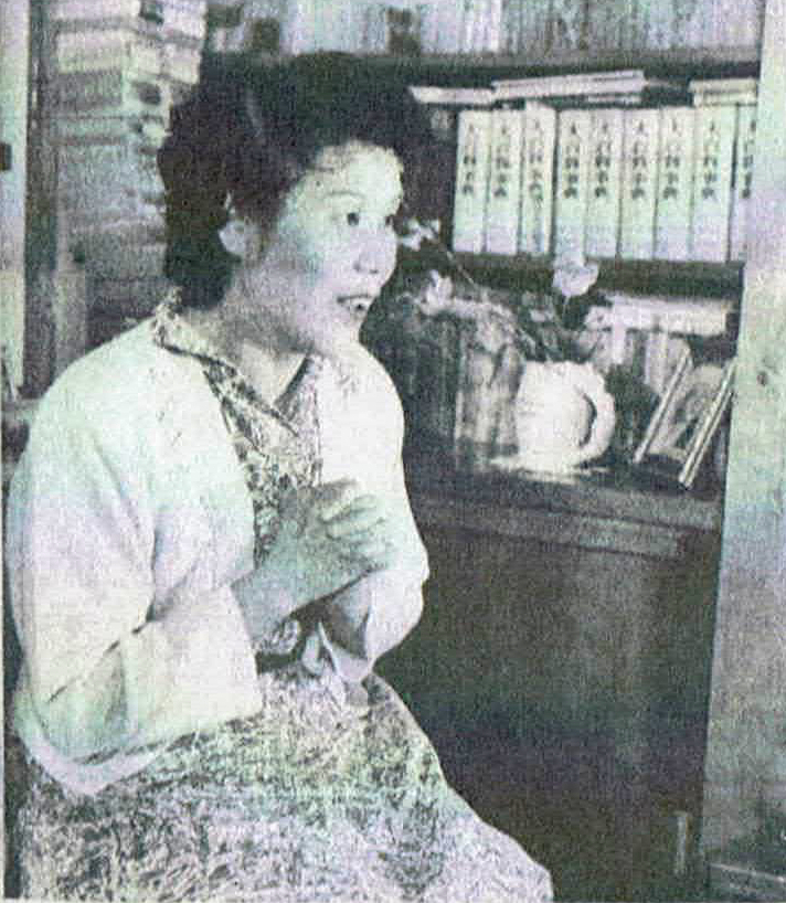 読売新聞社『家庭よみうり』358号（1953年）より大原富枝